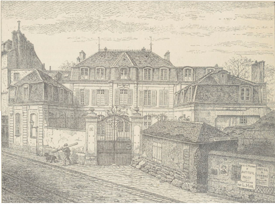 Ancien hôtel de la Folie 18 rue de Passy Paris